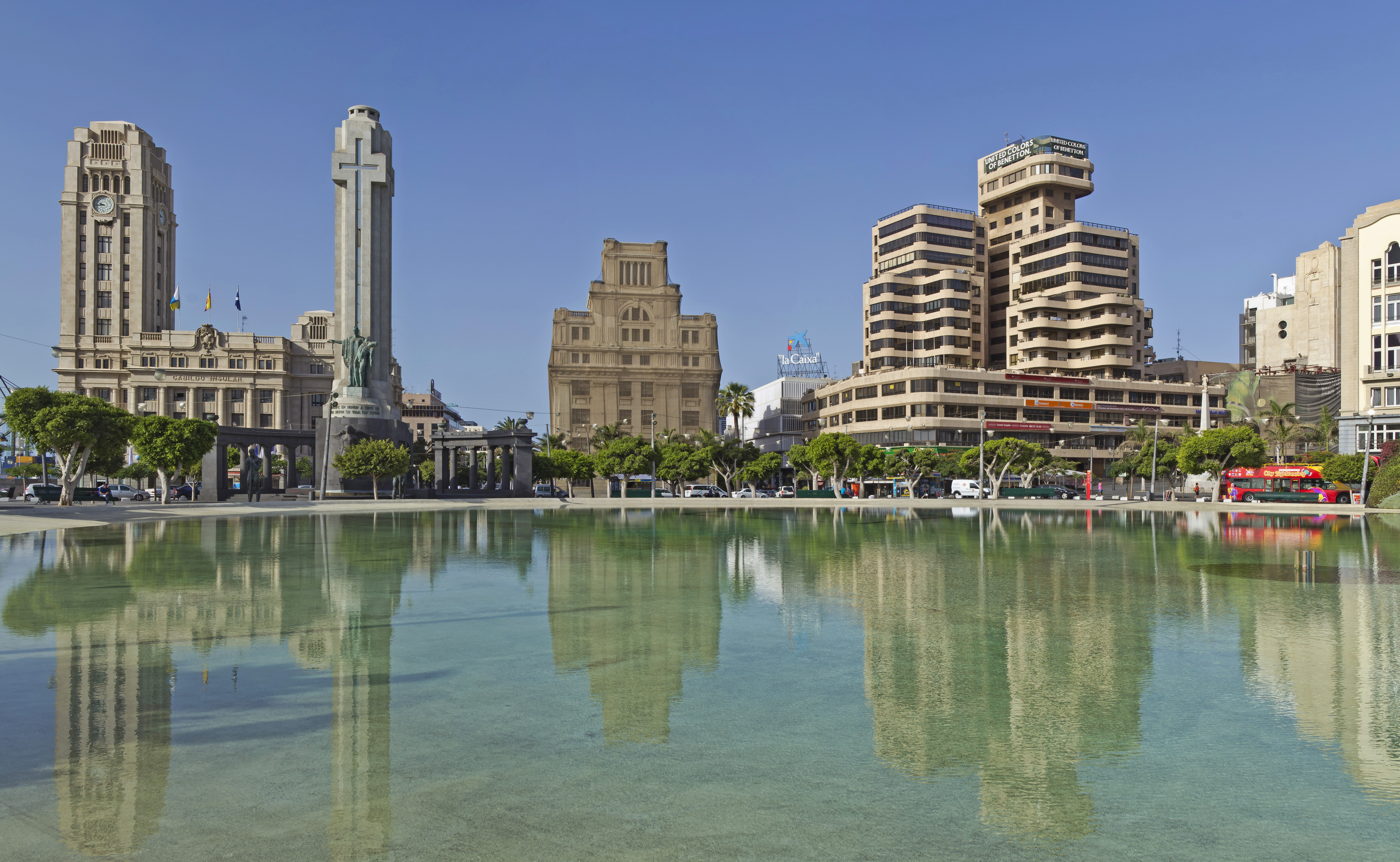 Gebäude auf der Südseite der Plaza de España in Santa Cruz de Tenerife